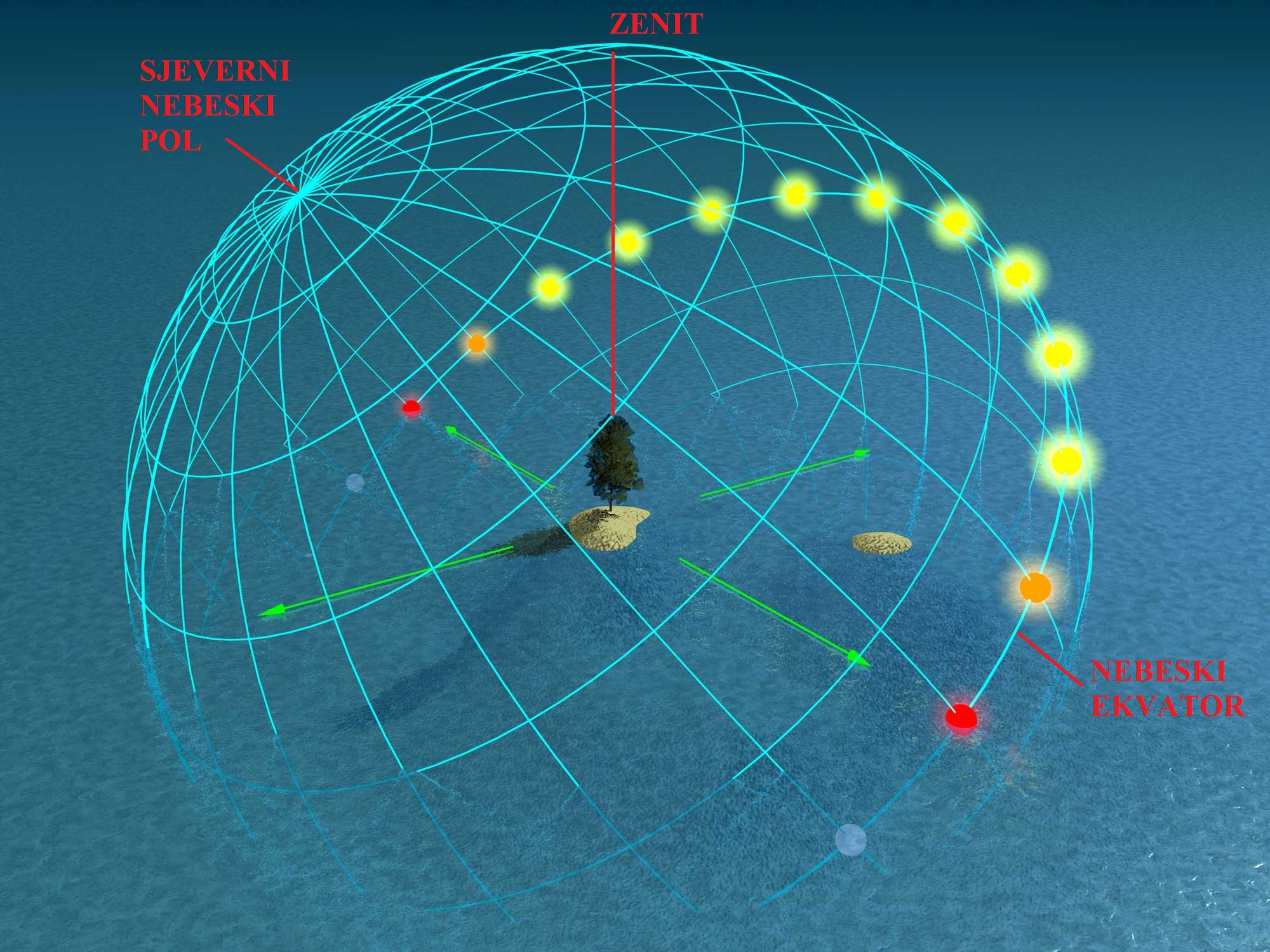 Zemljina vrtnja uzrok je prividnom okretanju nebeske sfere i izmjene dana i noći.